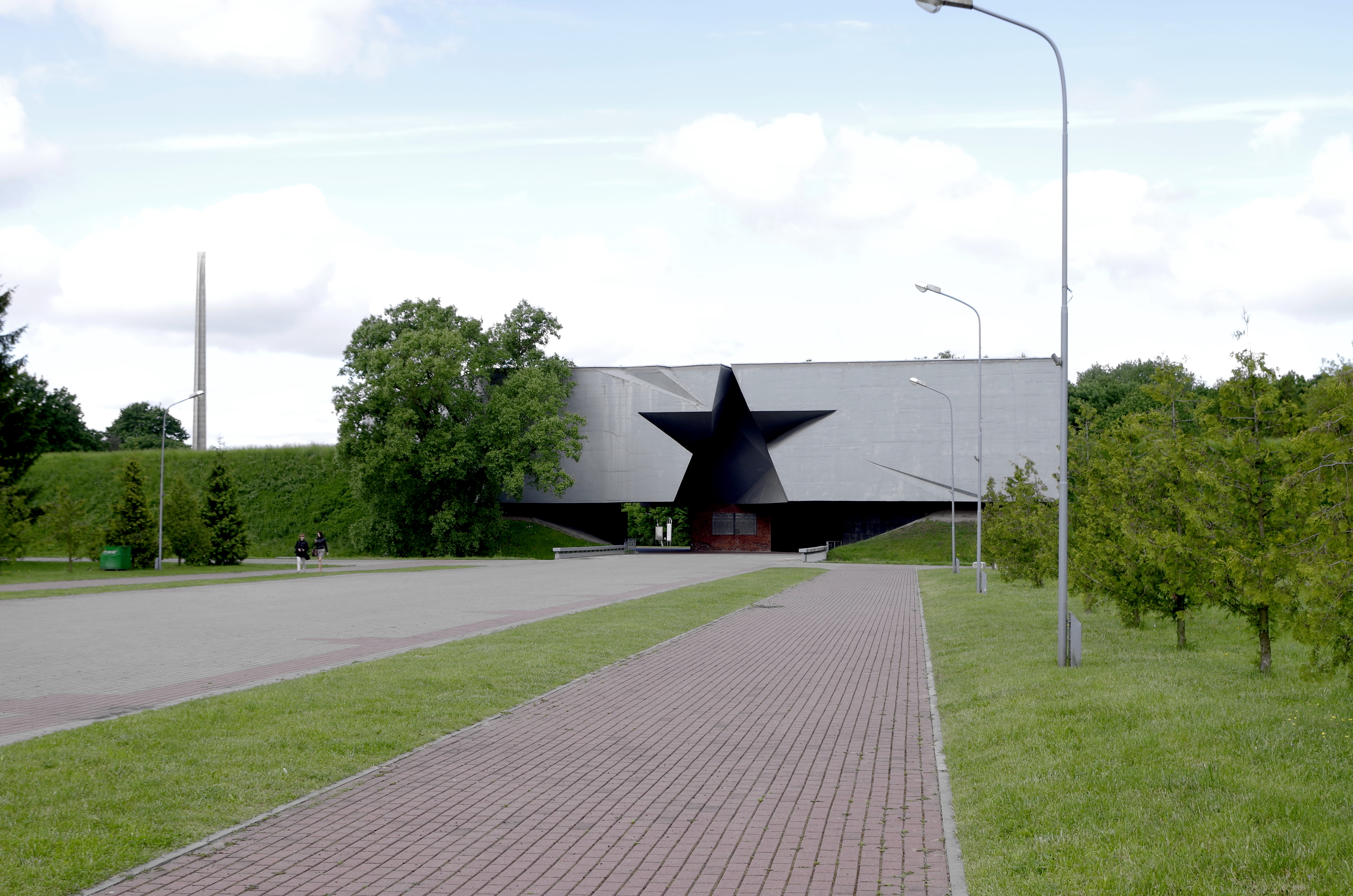 Brest Fortress, Brest, Belarus